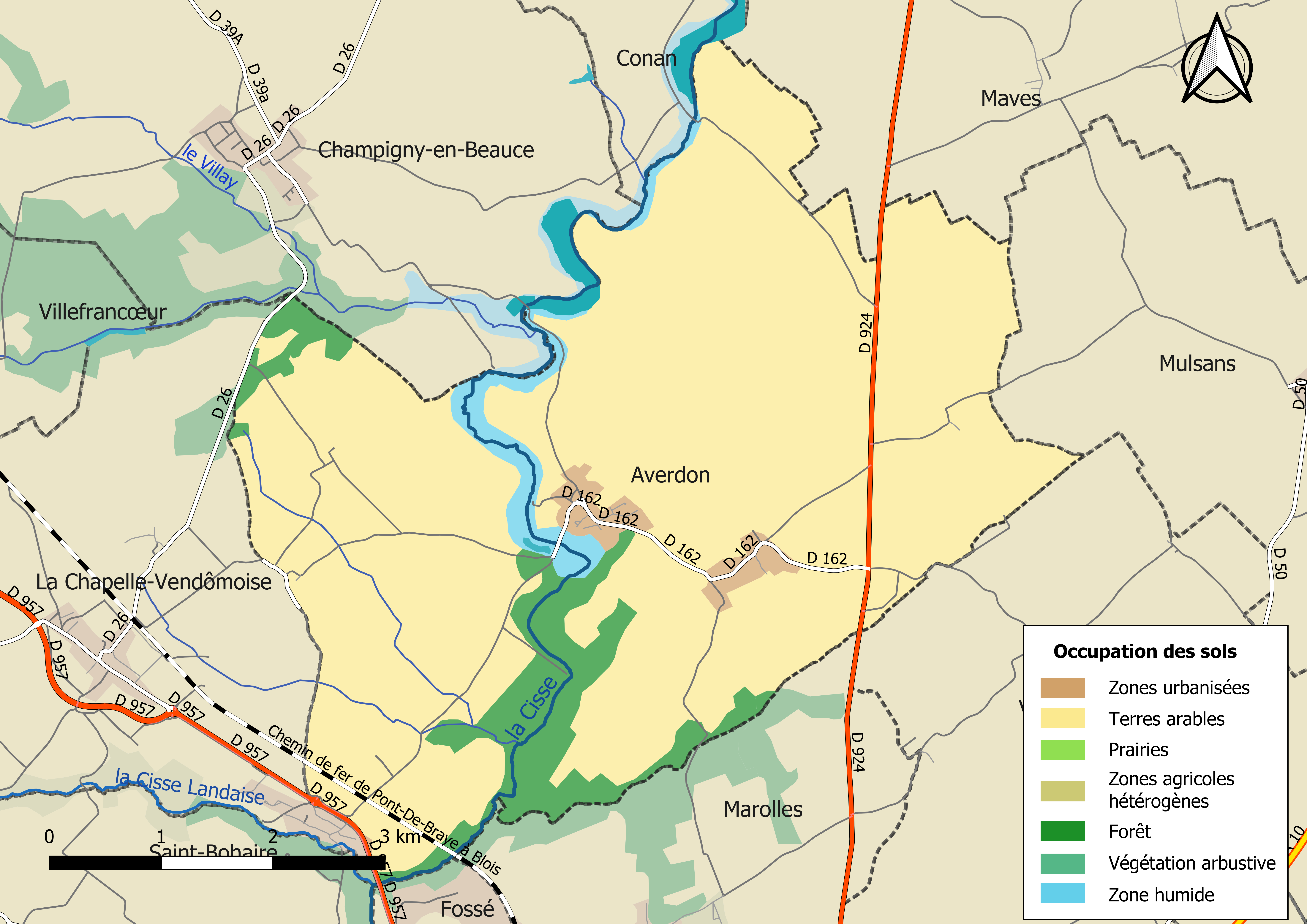 Carte des infrastructures et de l’occupation des sols en 2018 de la commune de Averdon (France).